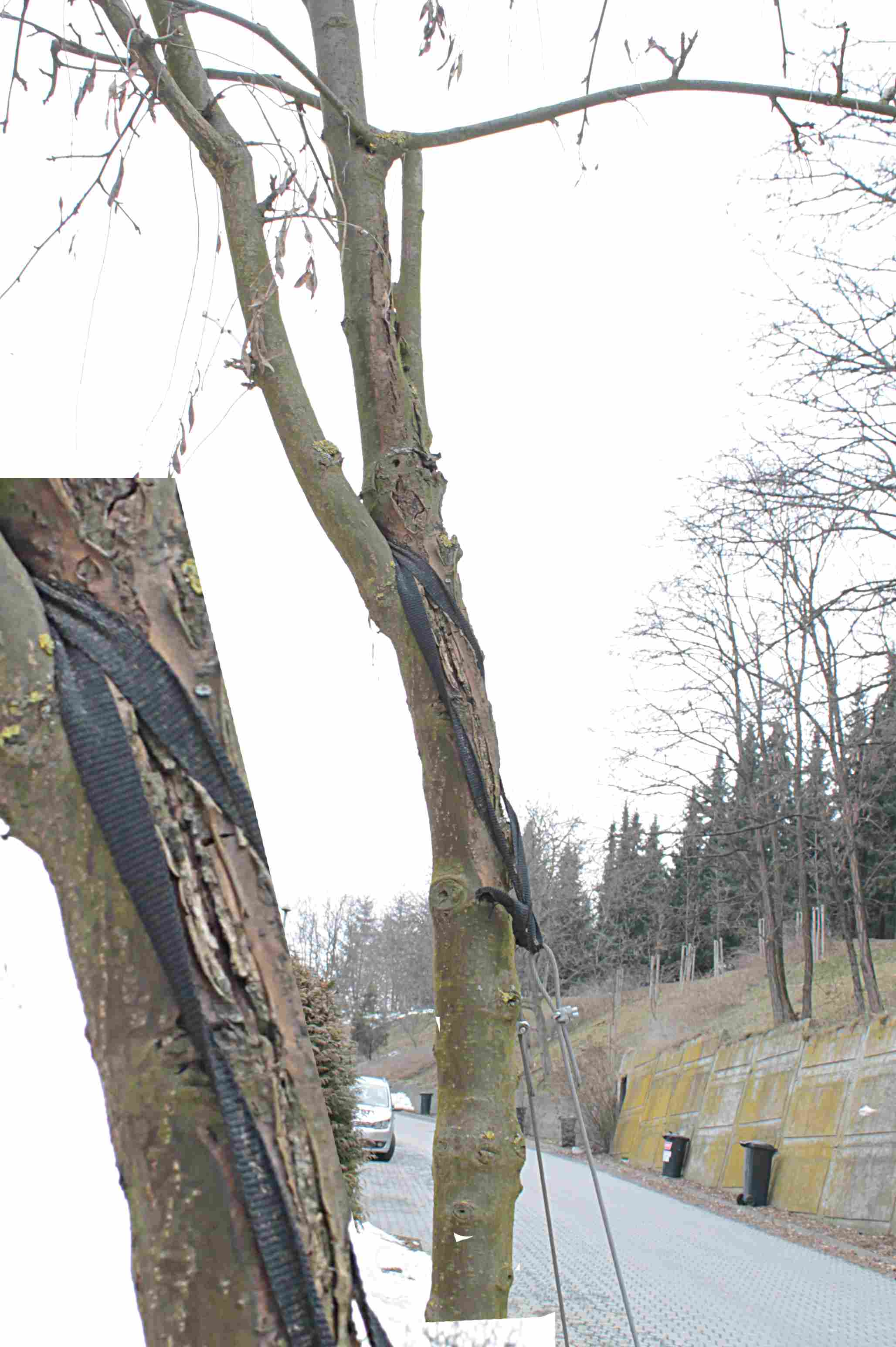 poškození úvazkem, veřejná zeleň, štědřenec Laburnum × watereri 'Vossii'.